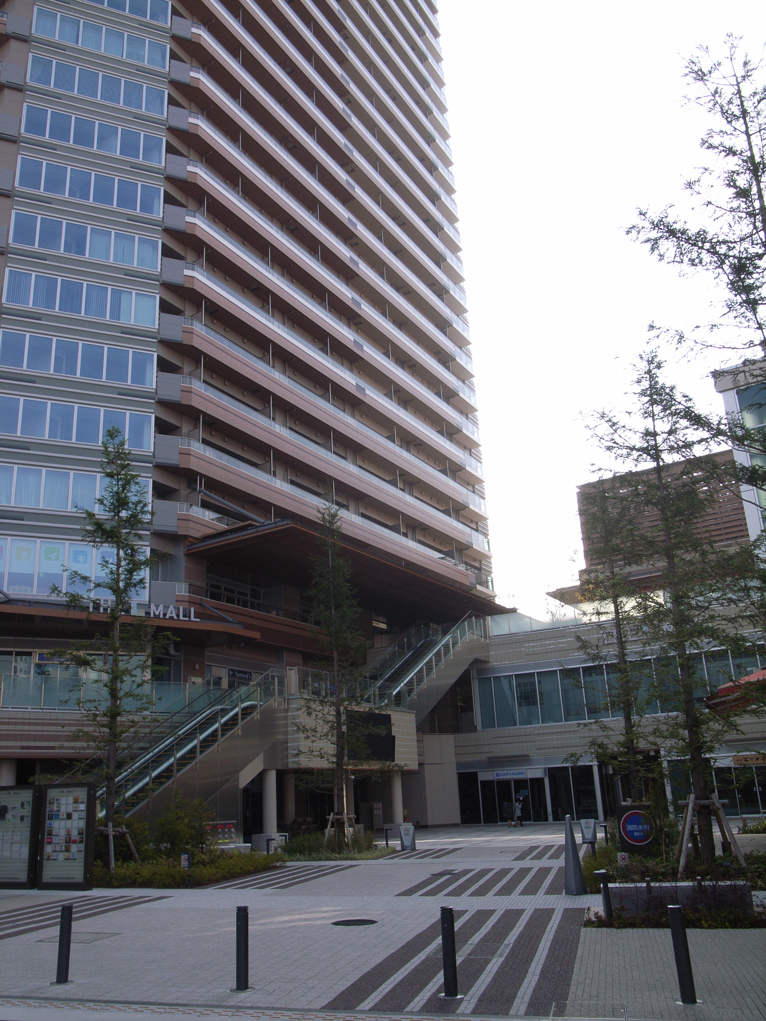 武蔵小山駅前のタワマン・パークシティ武蔵小山 ザ タワー。